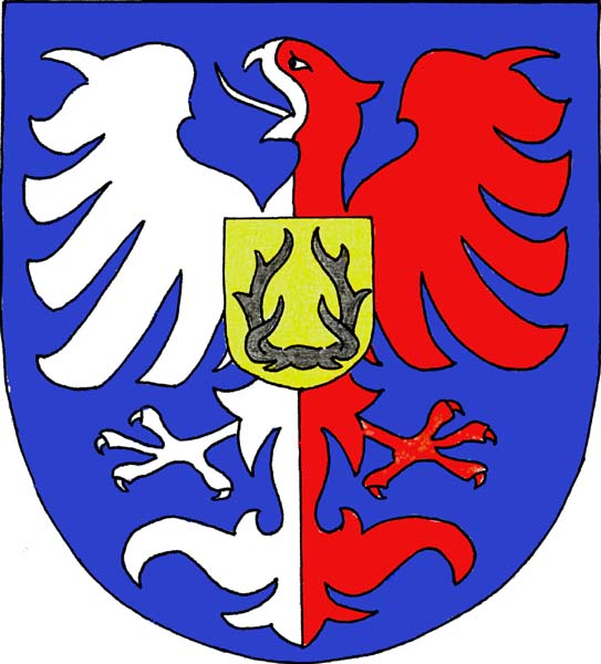 Znak obce Vrchotovy Janovice